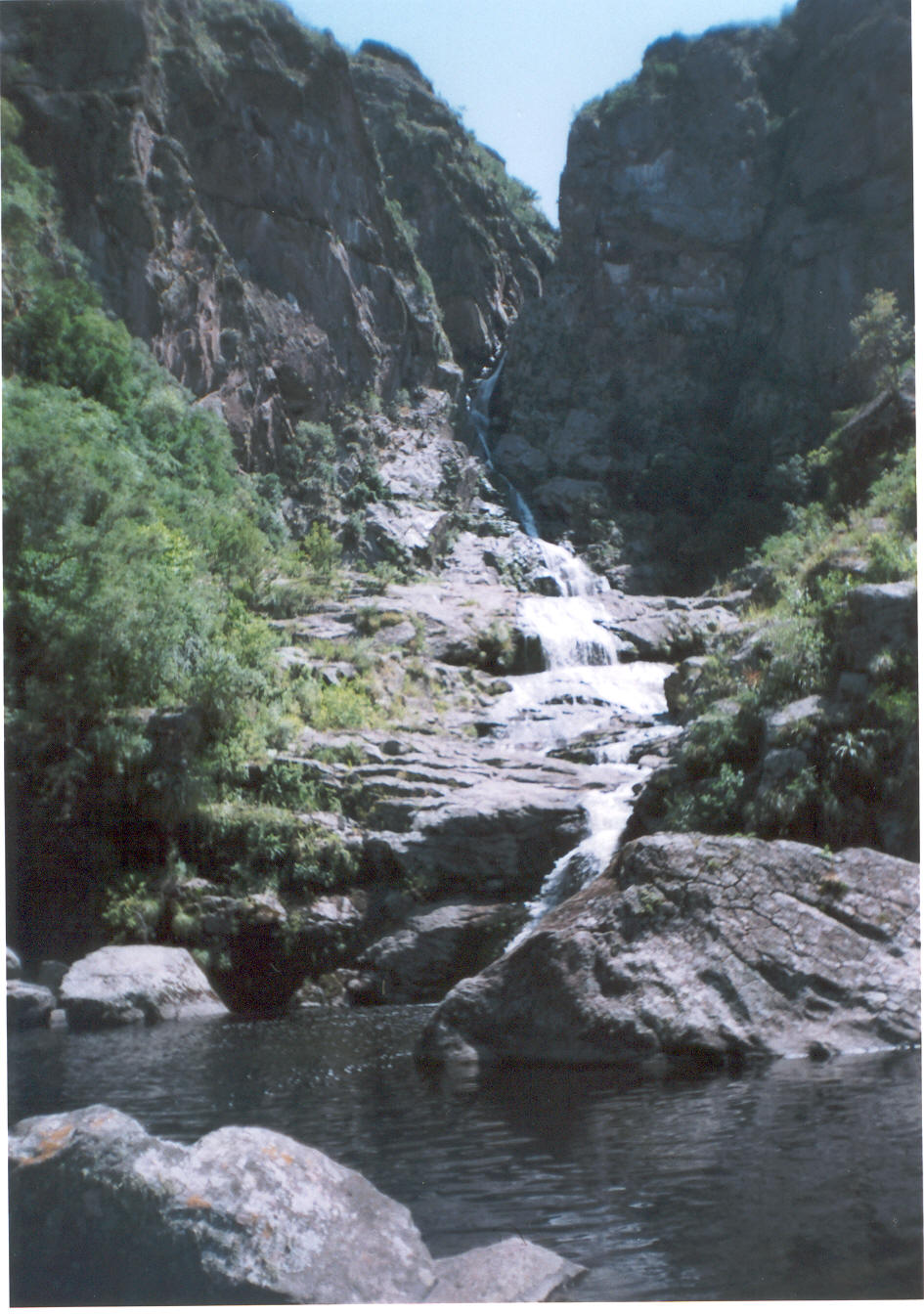 Cascada Los Chorrillos en Tanti - Córdoba - Argentina